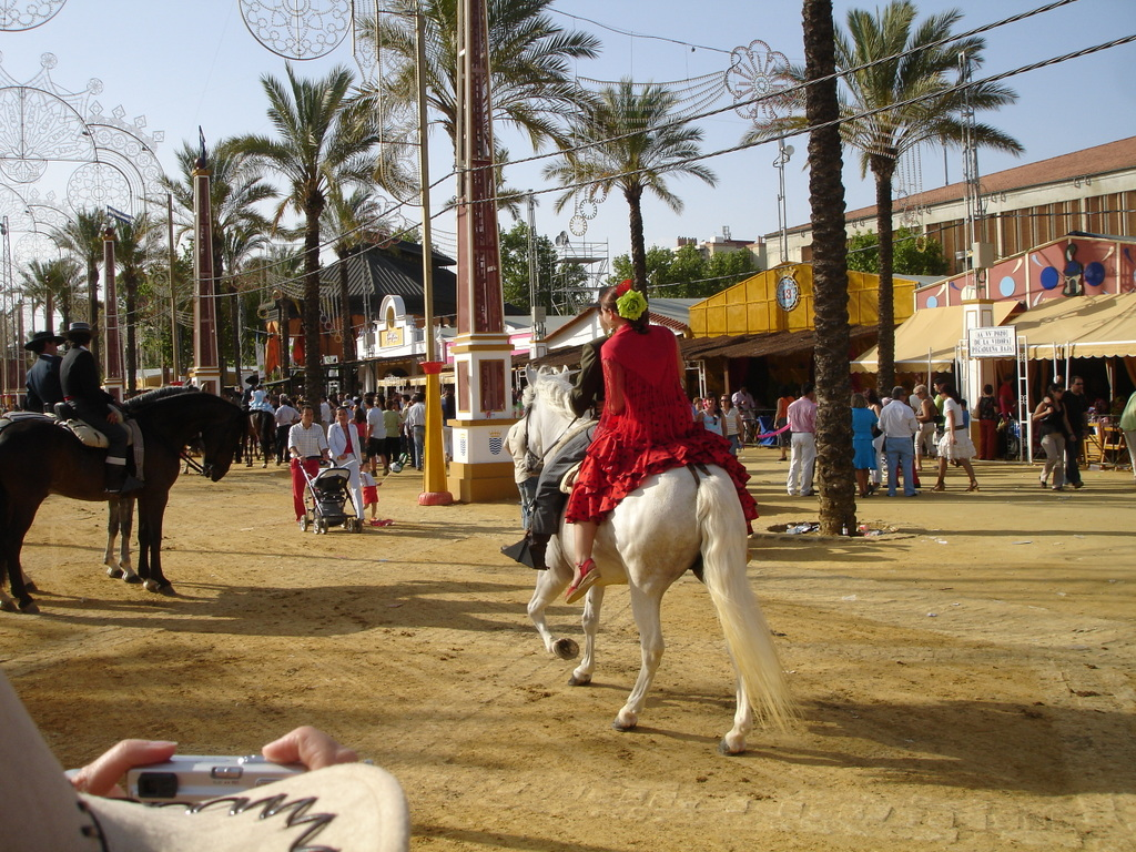 Feria del Caballo 2007, Jerez (Spain)